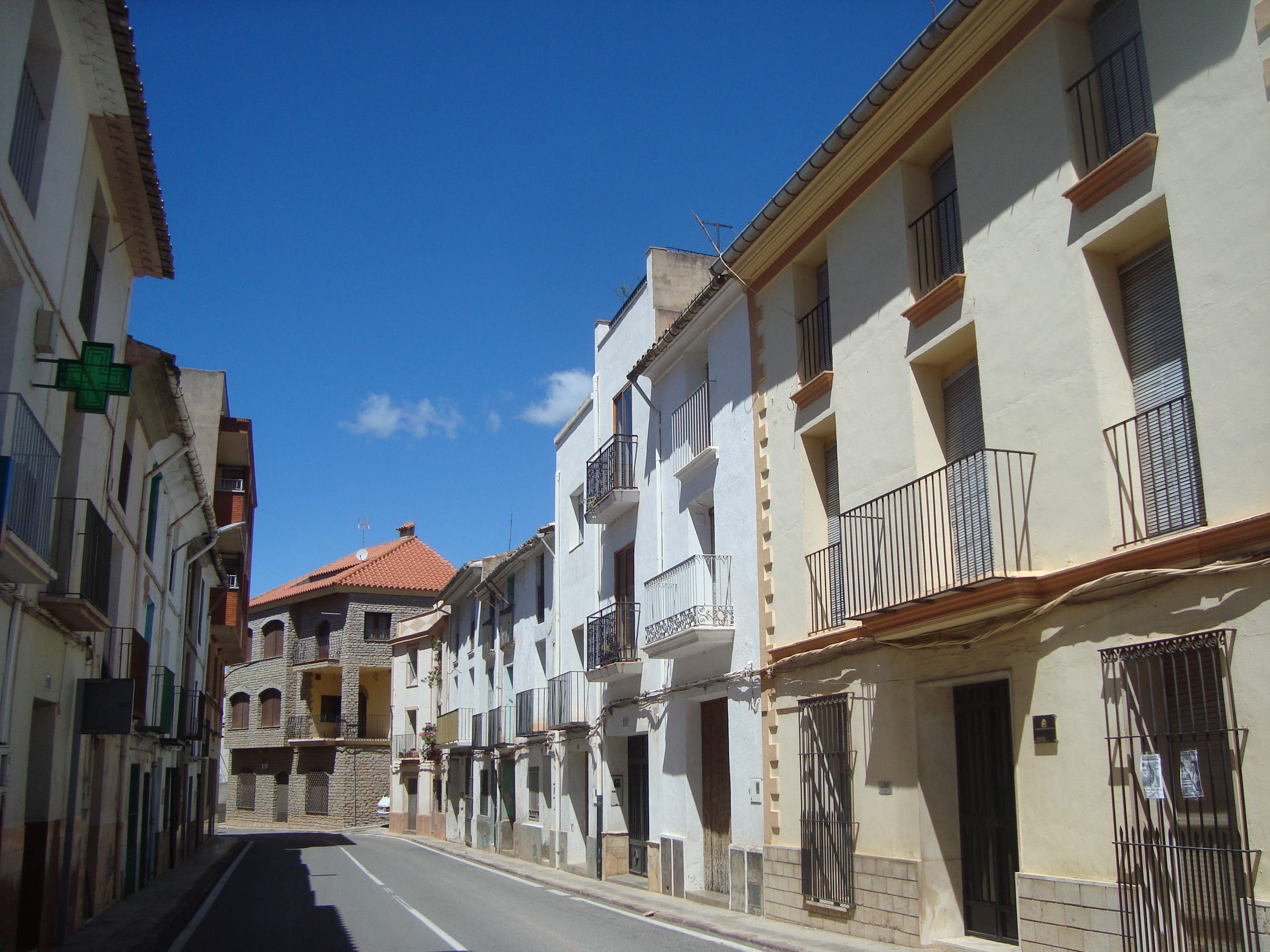 Perfil urbano, calle de Figueroles